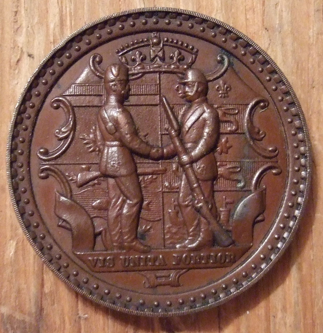 CANADA ---DOMINION OF CANADA, RIFLE ASSOCIATION 1868 b